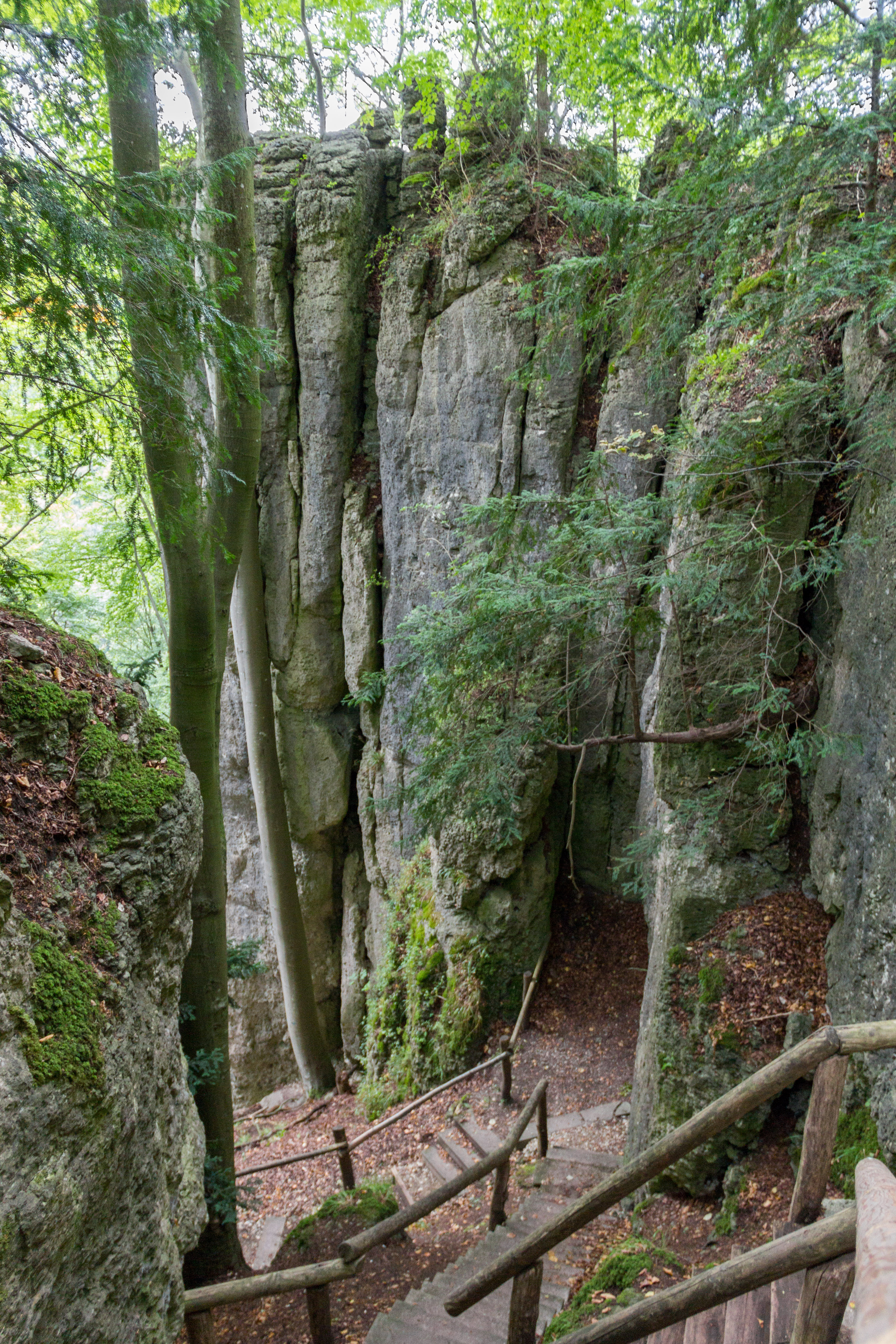 Napoleonsfels, Gößweinstein